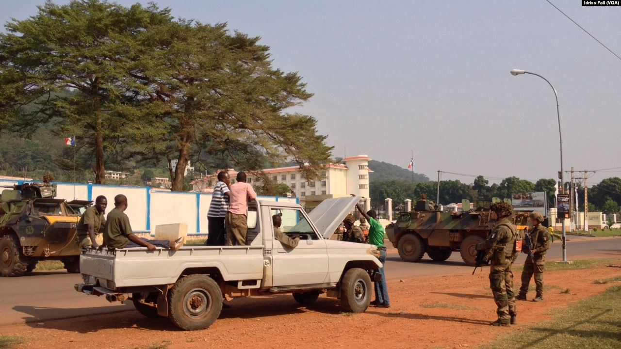 Checkpoint des soldats français en position à Bangui, République Centrafricaine. Décembre 22, 2013